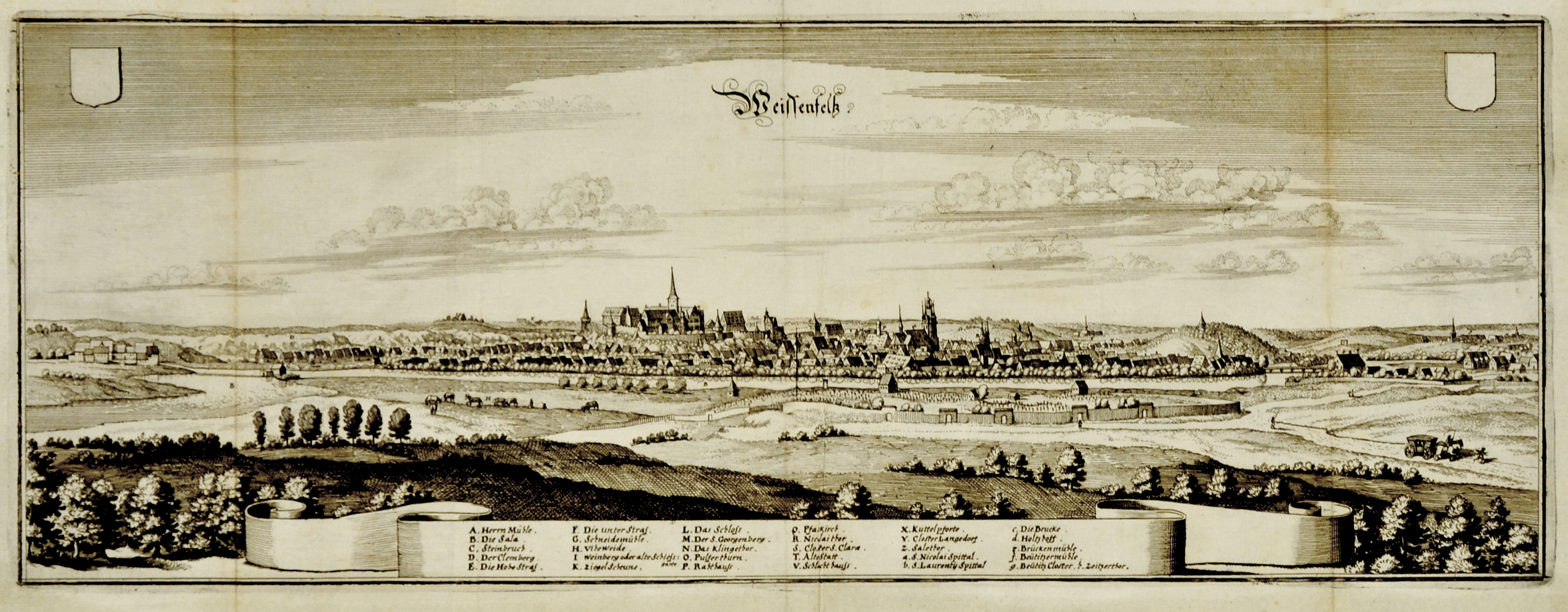 Kupferstich 19 x 51,5 cm von Matthäus Merian 1650